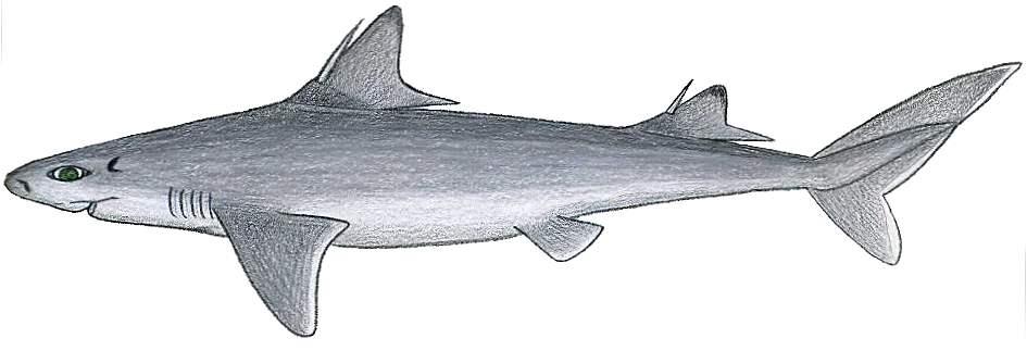 Squalus mitsukurii